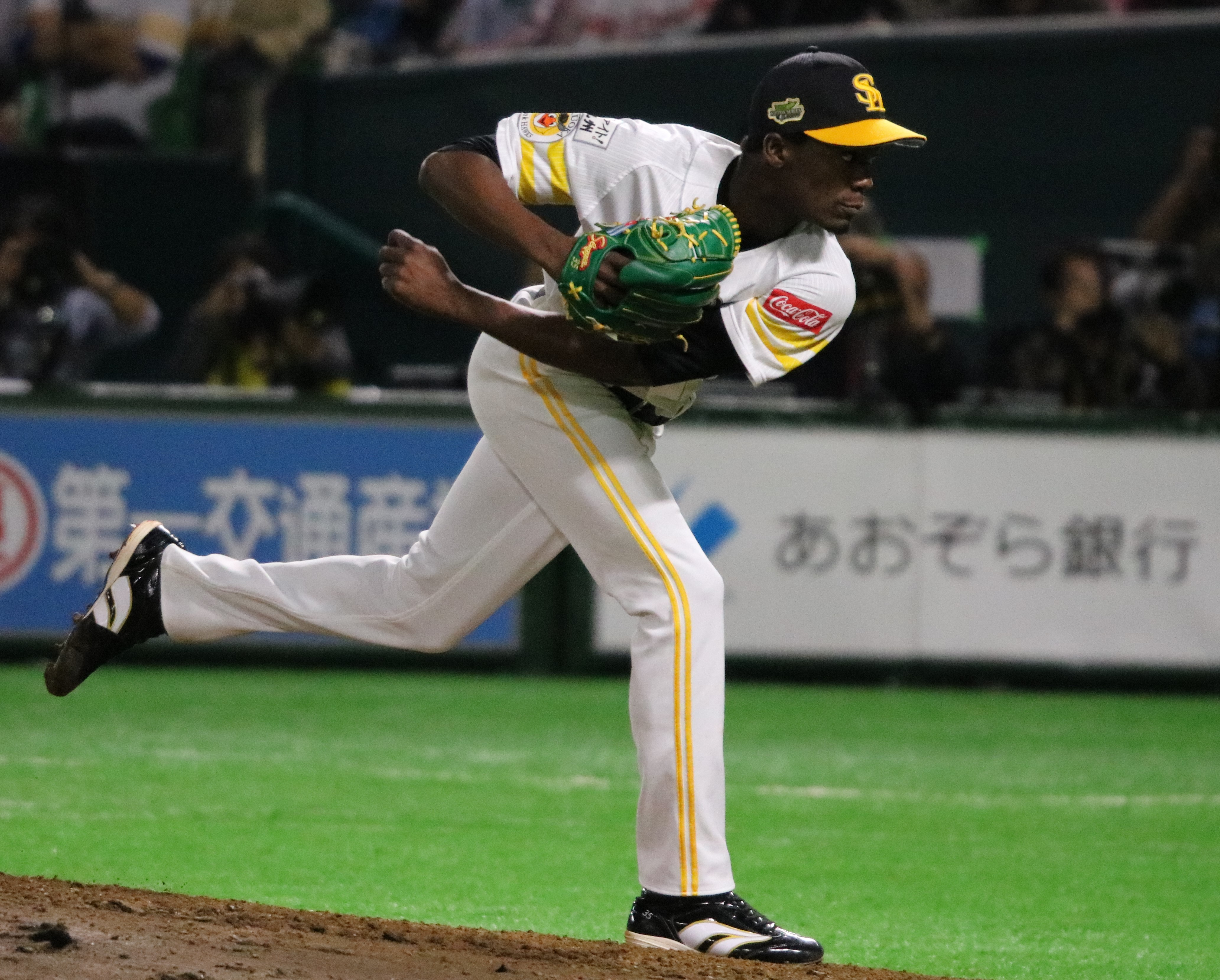 2017/11/4 日本シリーズ第6戦